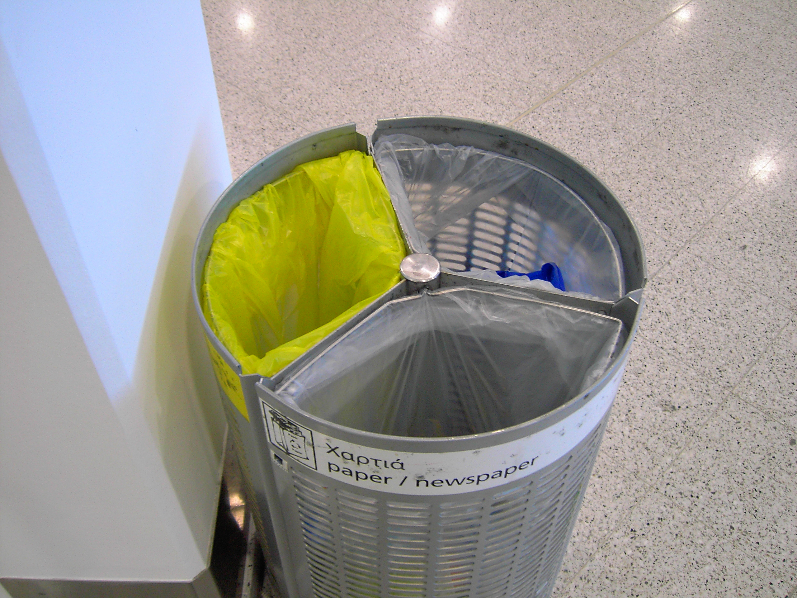 Photo personnelle